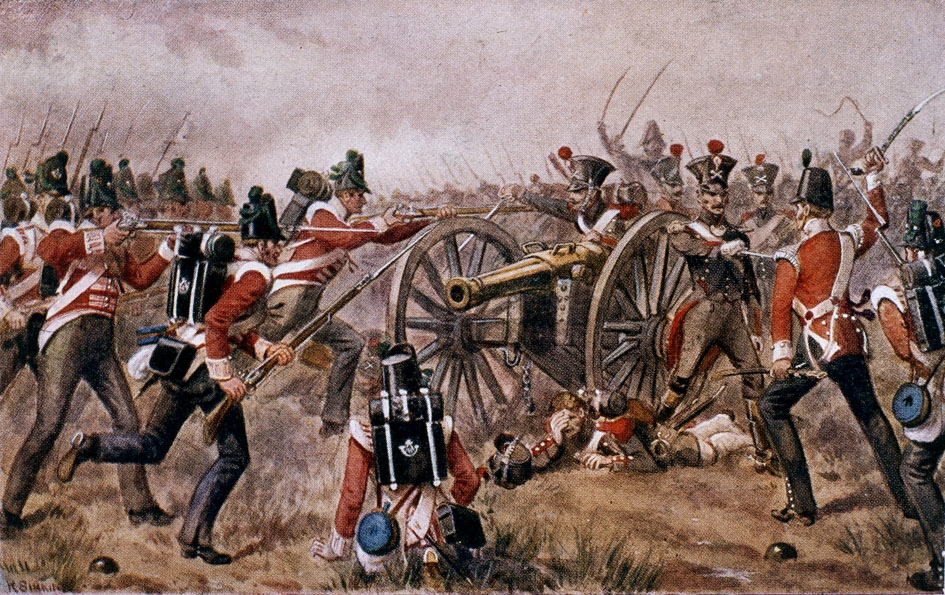 Le 43e régiment britannique s'empare d'un canon français lors de la bataille de Sabugal, le 3 avril 1811.